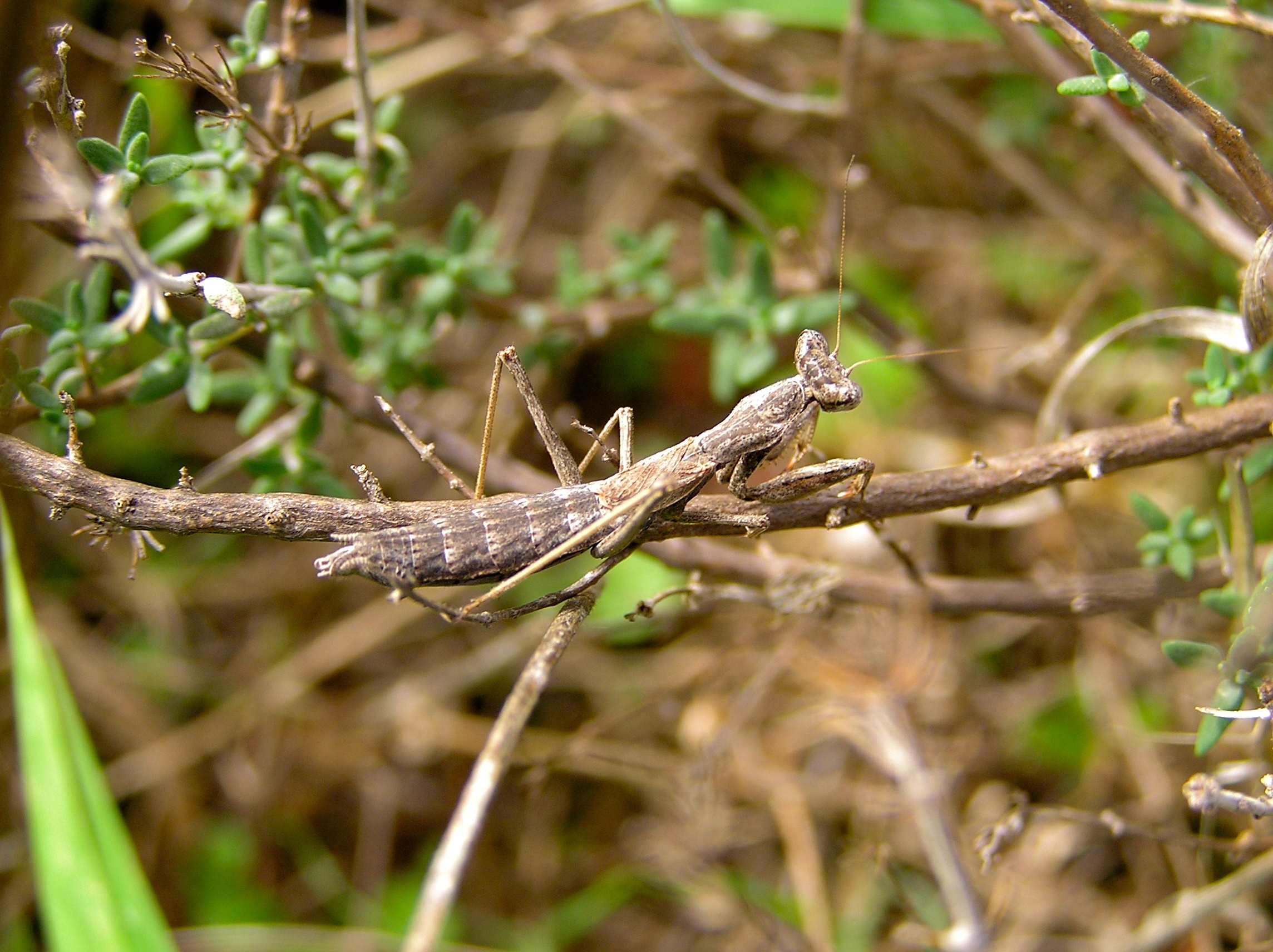 Octon, Hérault, FRANCE